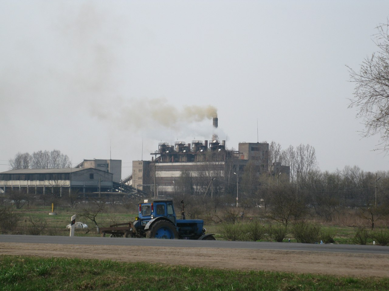 Беларуская (тарашкевіца): Торфабрыкетны камбінат у Старобіне